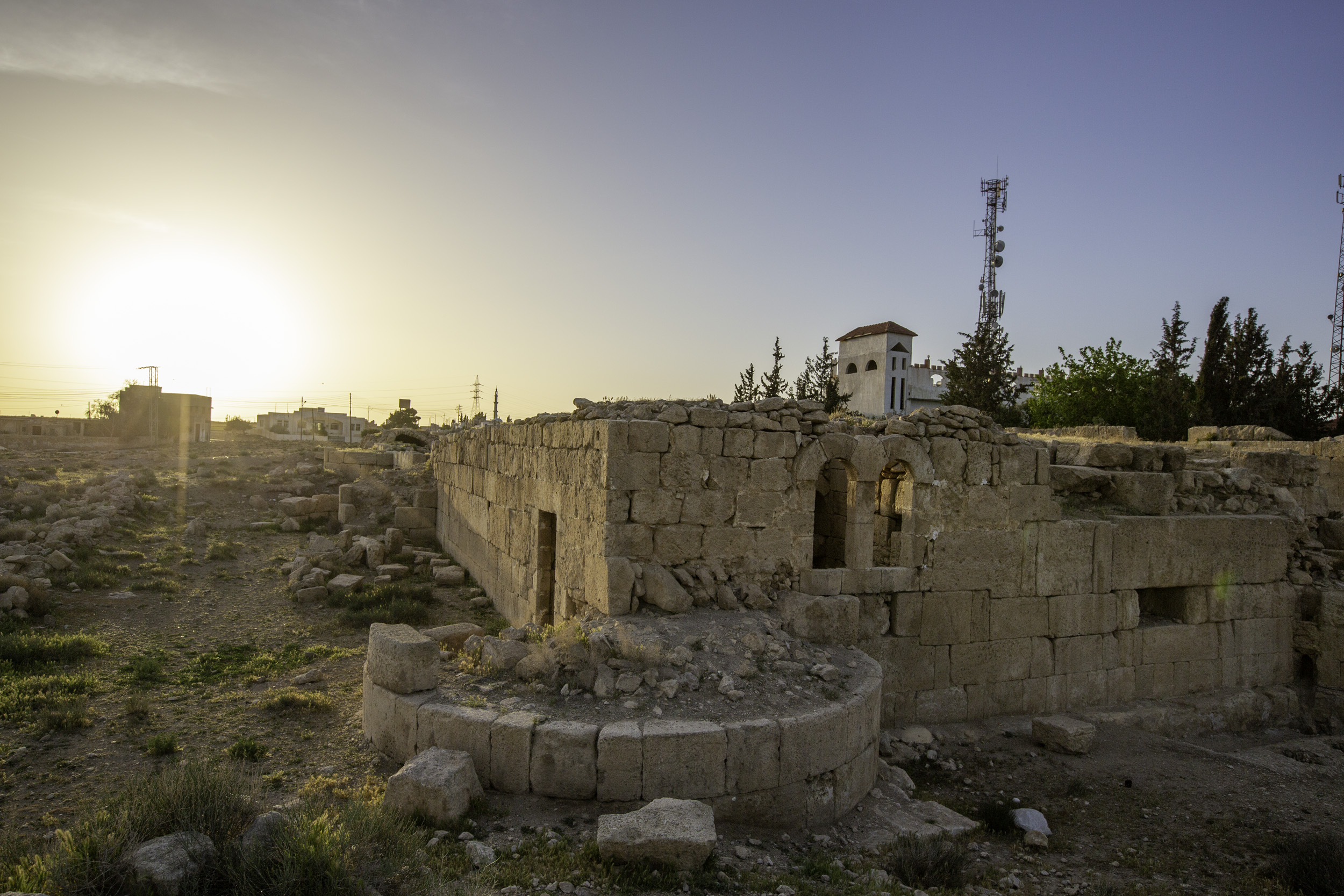 Al Qastal, Jordan